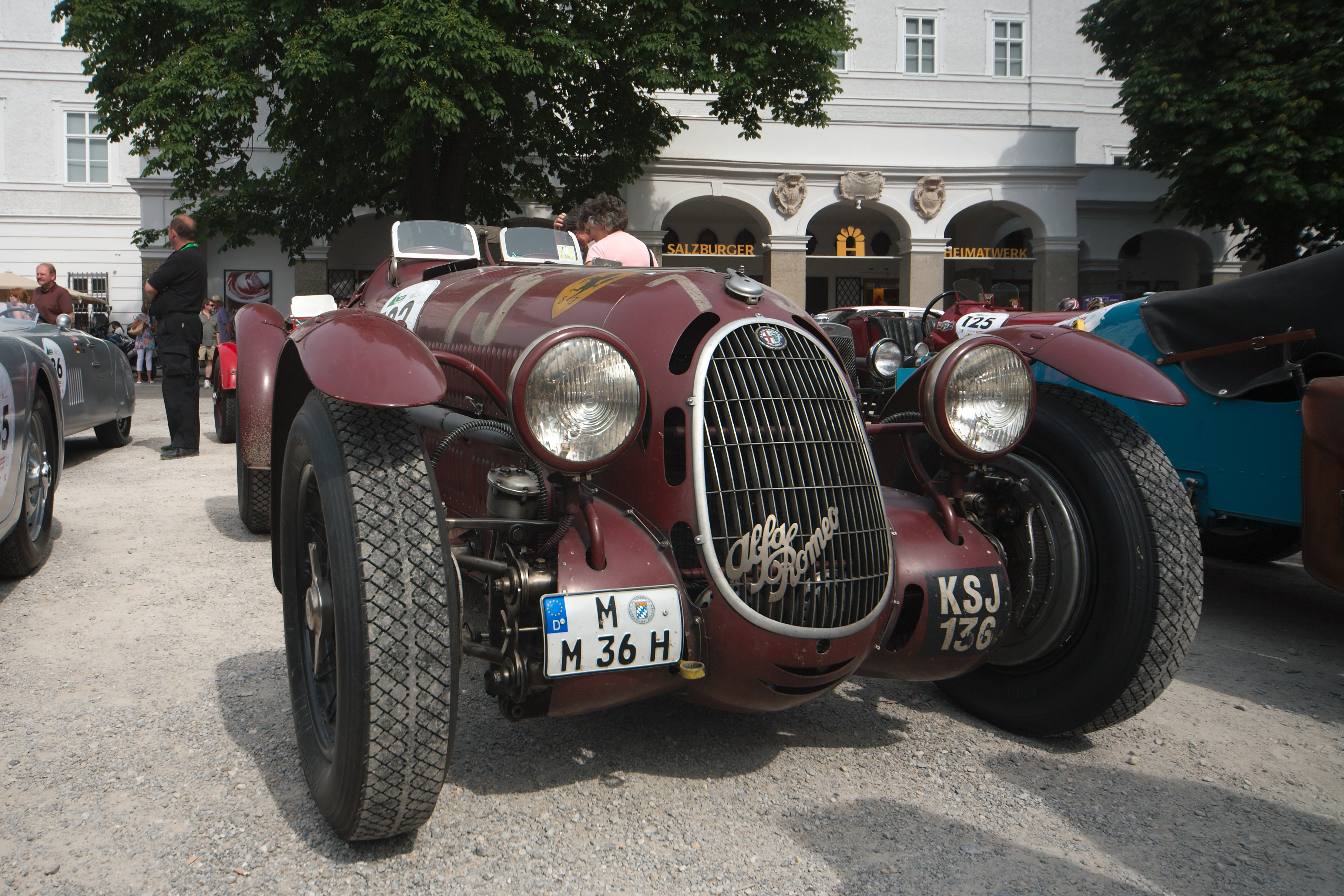 Alfa Romeo 8C 2900 from 1936 at Gaisbergrennen 2009 in Salzburg